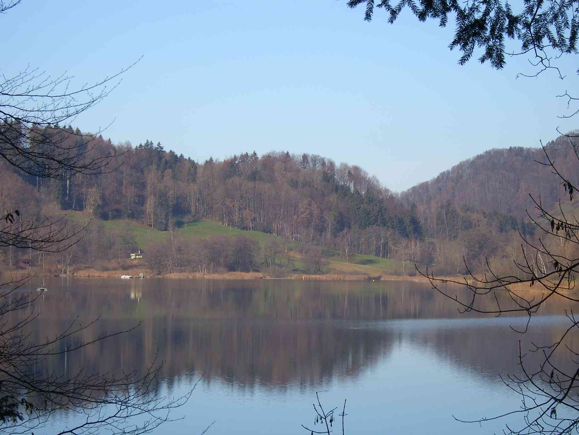 Türlersee bei Aeugst und Hausen am Albis, Kanton Zürich, Schweiz